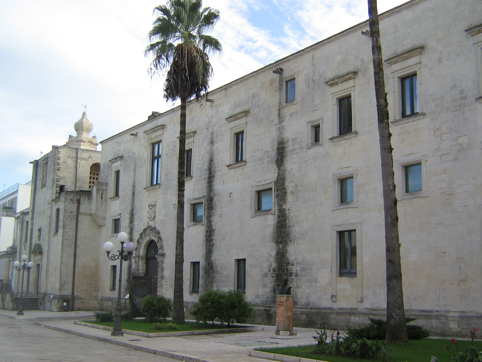 Chiesa e Convento dei Domenicani Cavallino